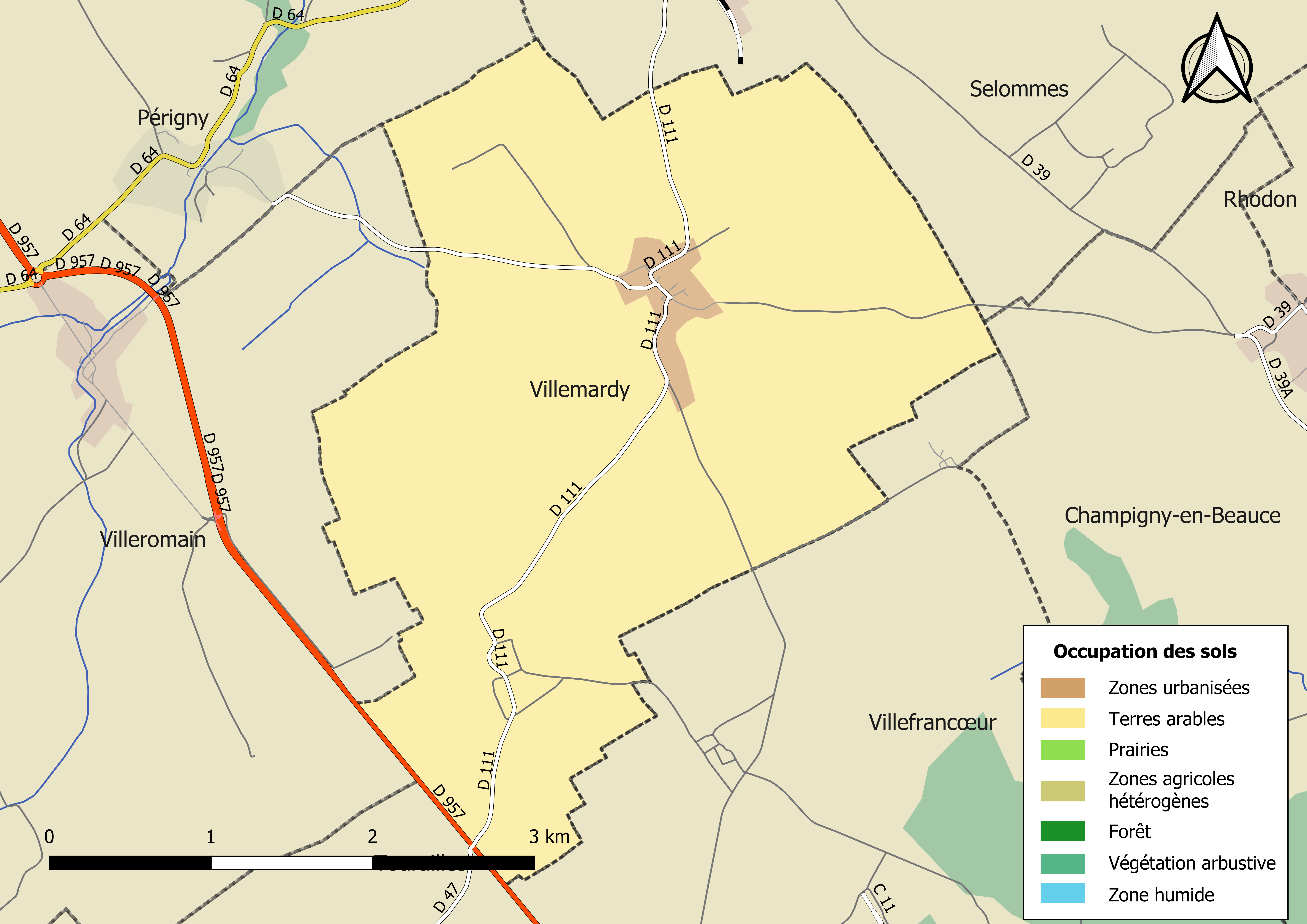 Carte des infrastructures et de l’occupation des sols en 2018 de la commune de Villemardy (France).